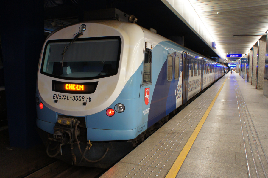 Elektryczny zespół trakcyjny EN57AL-3008 stoi na stacji Warszawa Centralna.